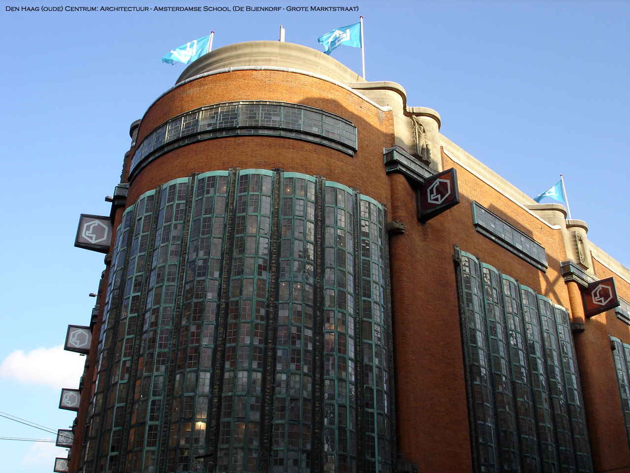 Zelfgemaakte media